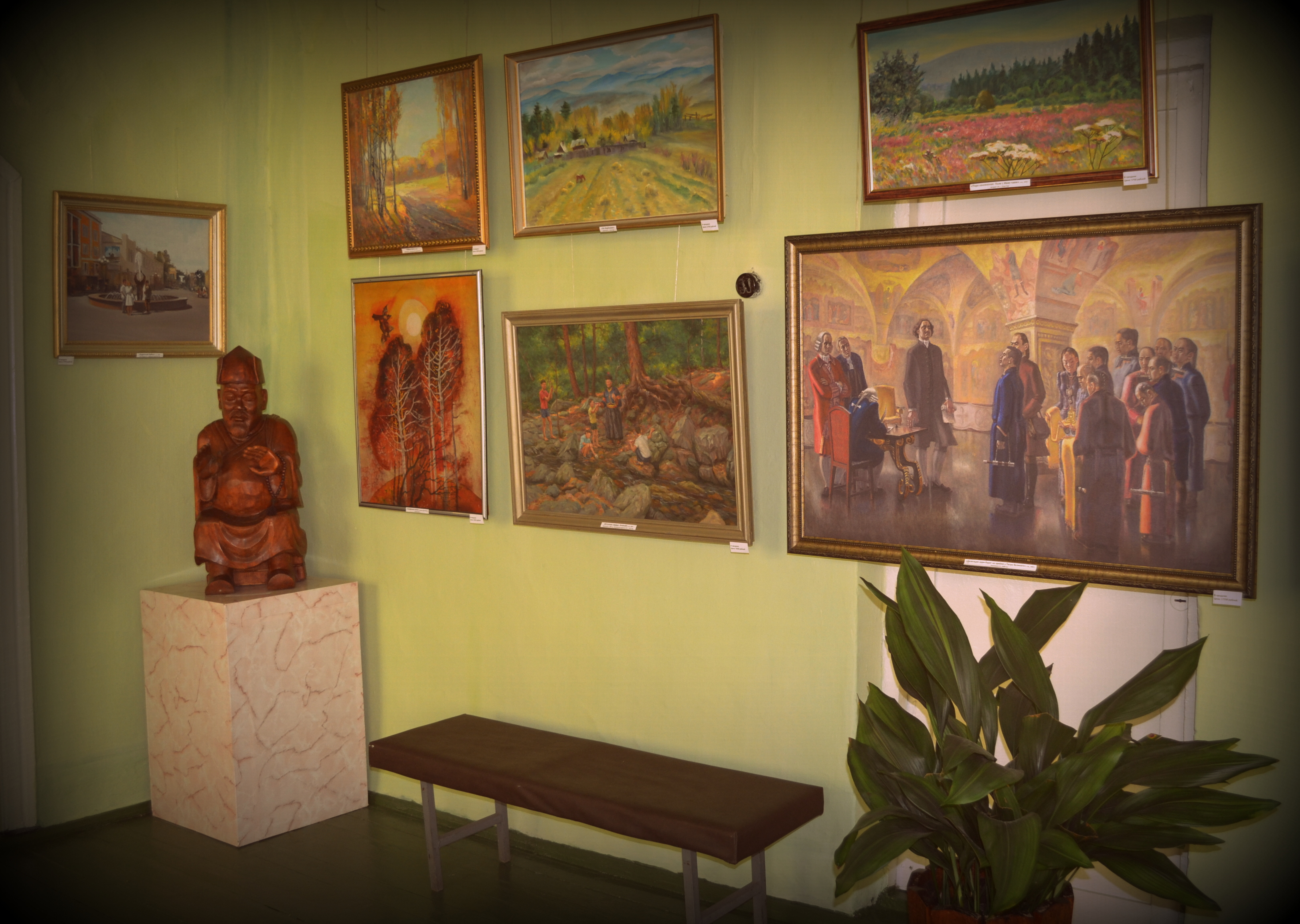 В Джидинской народной галерее. Село Петропавловка, Джидинский район, Бурятия